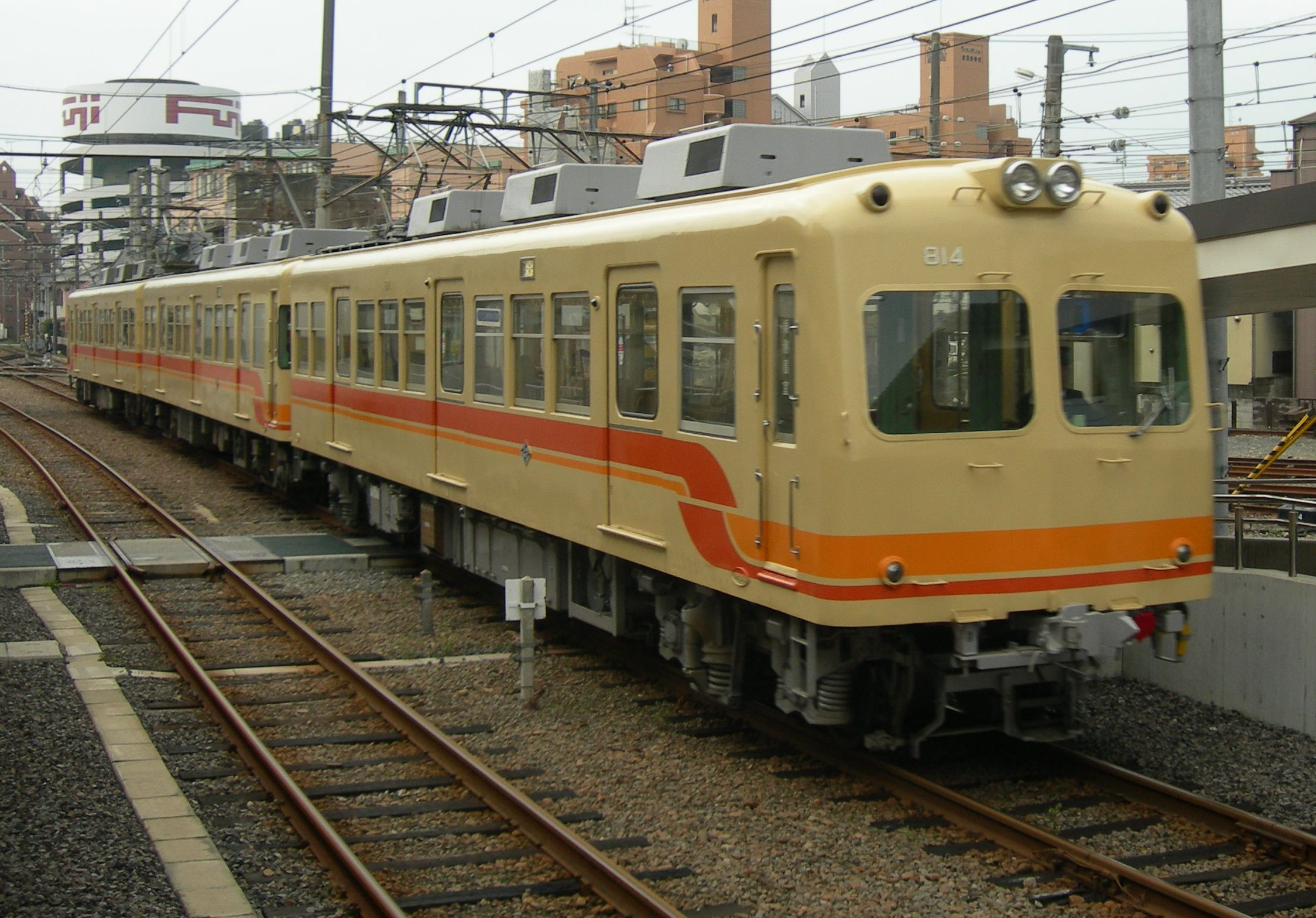 伊予鉄道800系電車